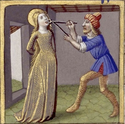 Heures de Charles VIII 109V Sainte Appoline